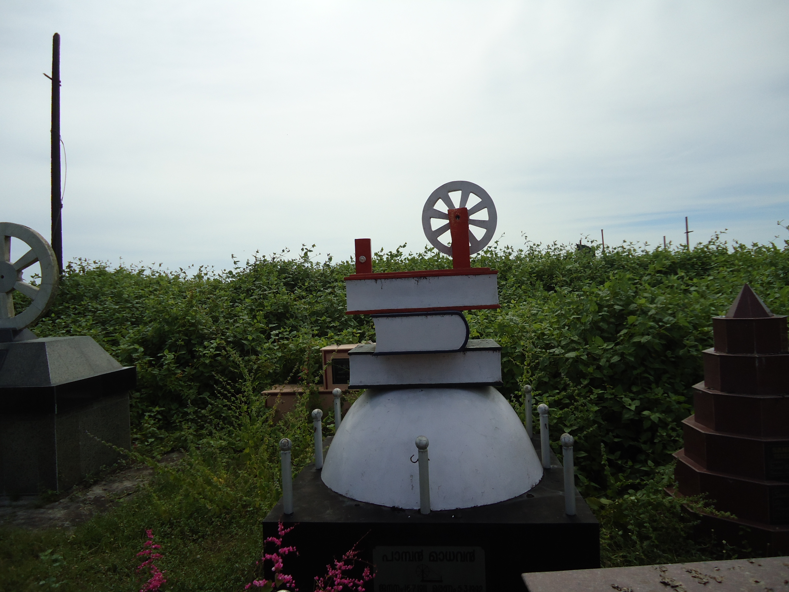 പാമ്പൻ_മാധവന്റെ_ശവകുടീരം